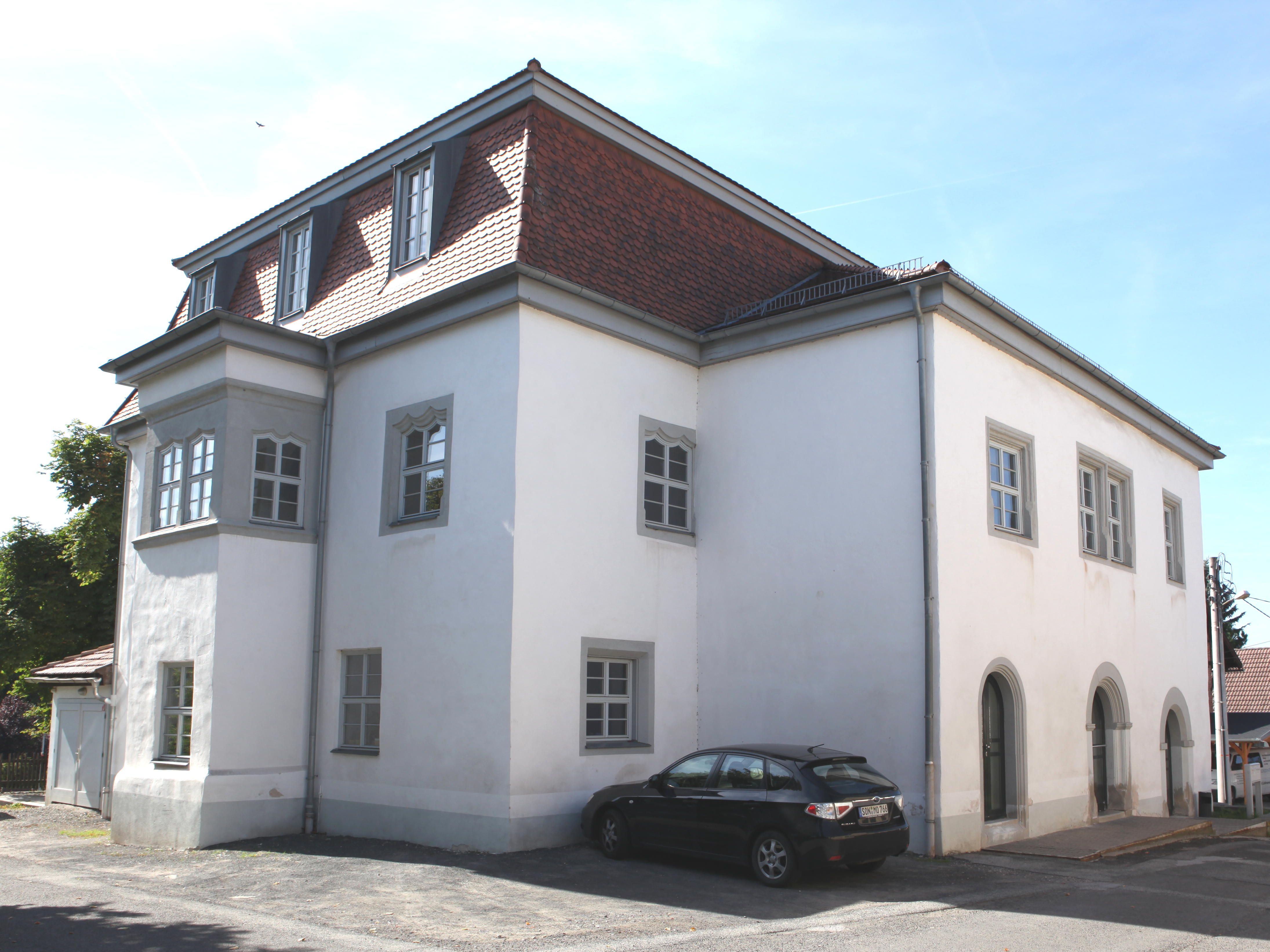 Rathaus der Gemeinde Frankenblick im Effelder-Schloss